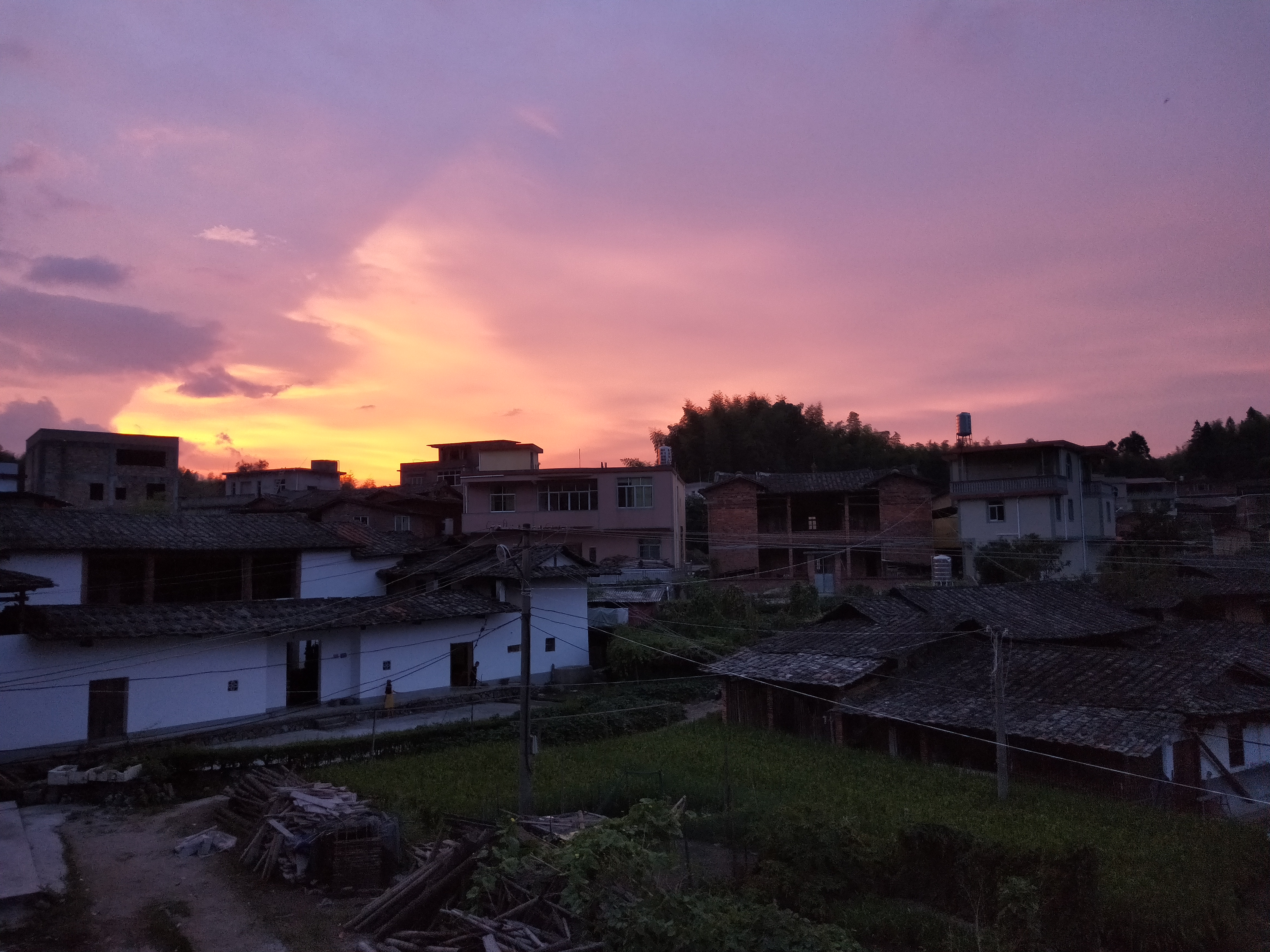 中文（中国大陆）: 横口乡福联村一景